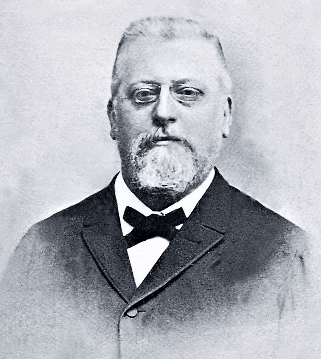 Der Mykologe Léon Louis Rolland vor 1912